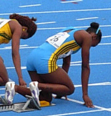 Mistrzostwa Świata Juniorów w Lekkiej Atletyce Bydgoszcz 2008